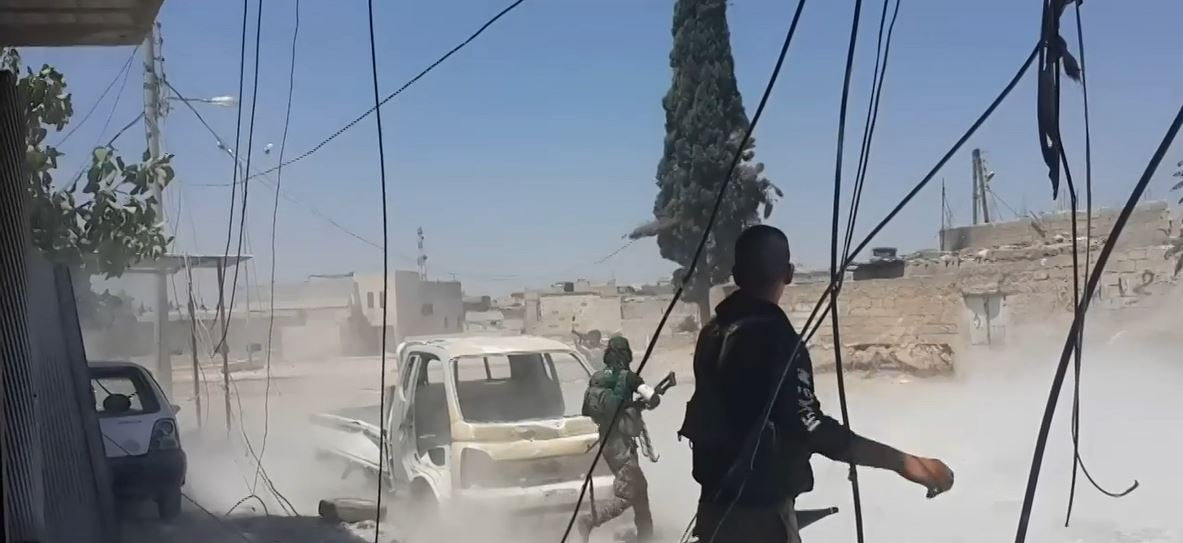 Membres des FDS àMAnbij, le 29 juillet 2016.